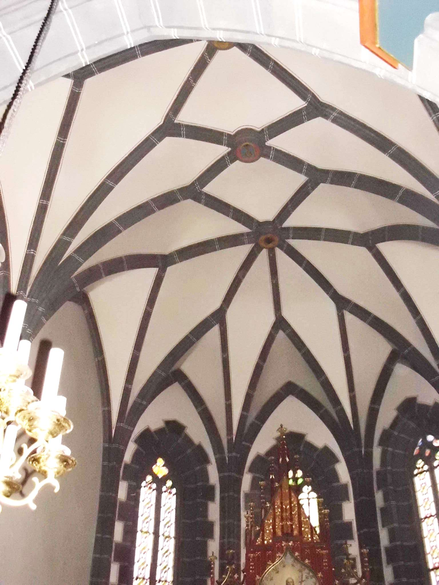 Evang. Kirche St. Jodokus in Gunzenhausen-Unterwurmbach, Landkreis Weißenburg-Gunzenhausen (Bayern), Netzgewölbe im Chor